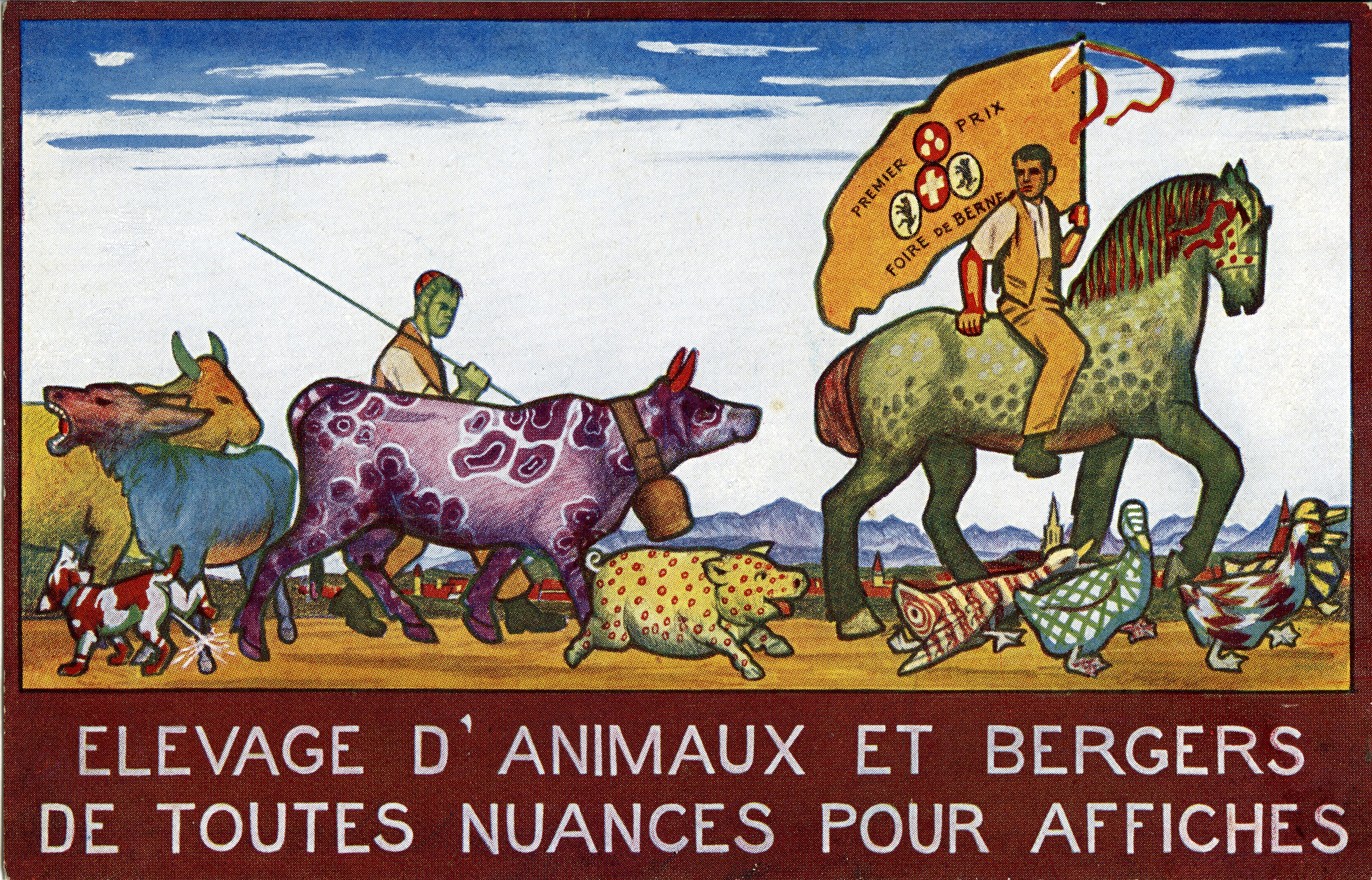 «Élevage d'animaux et bergers de toutes nuances pour affiches» : pastiche anonyme du Cheval Vert d'Emil Cardinaux